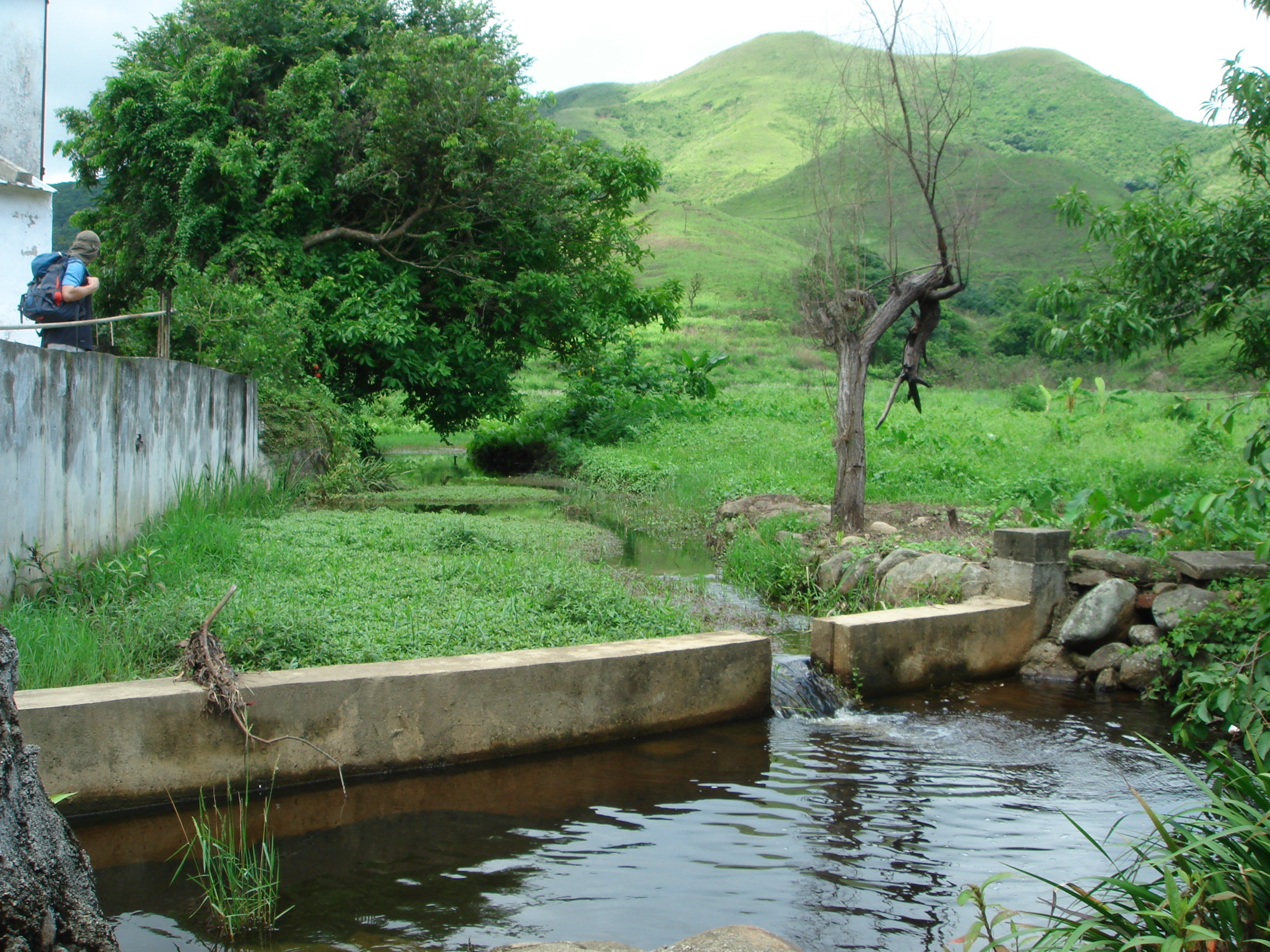 中文（香港）: 蓮麻坑。